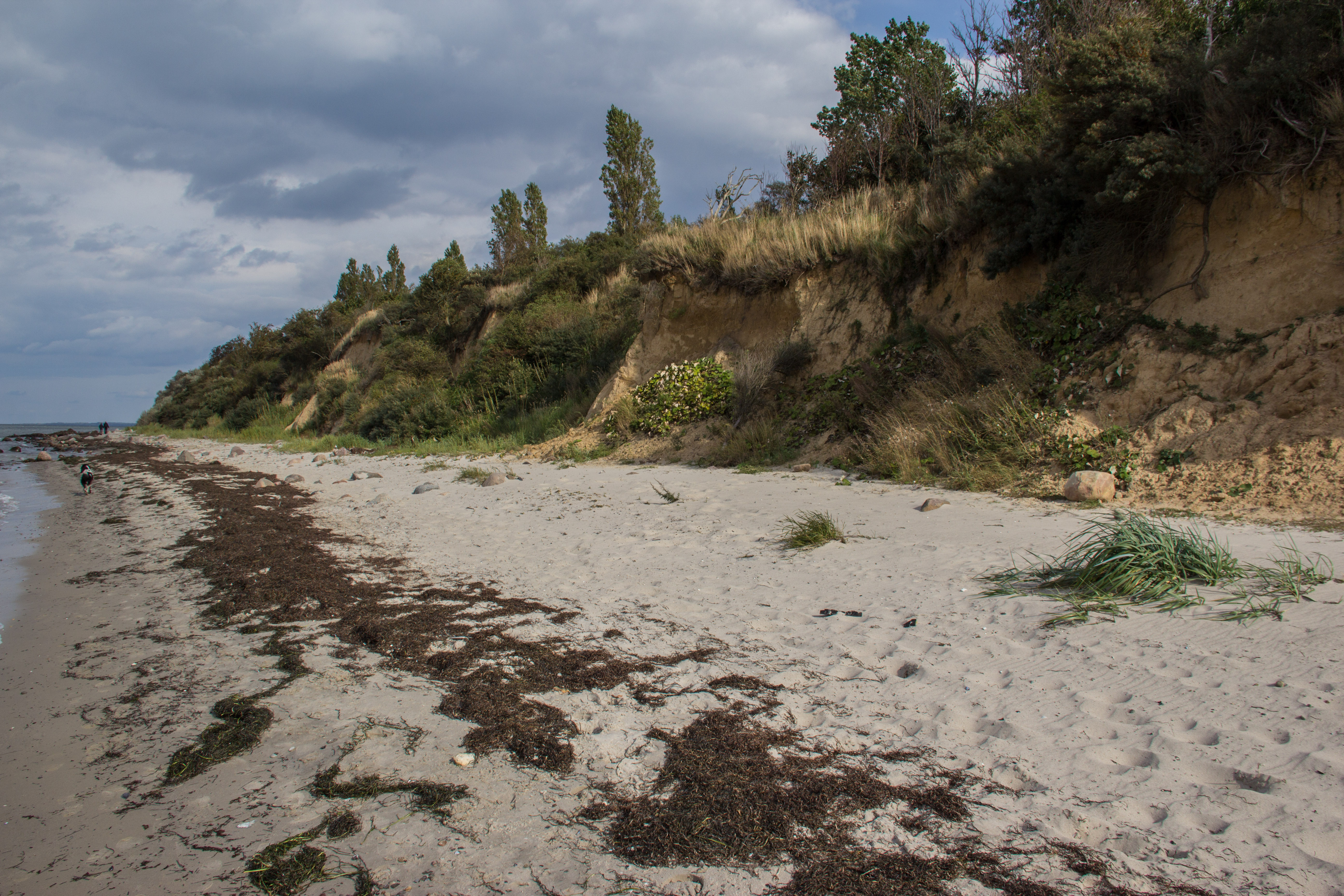 Insel Poel, Wismarbucht und Salzhaff